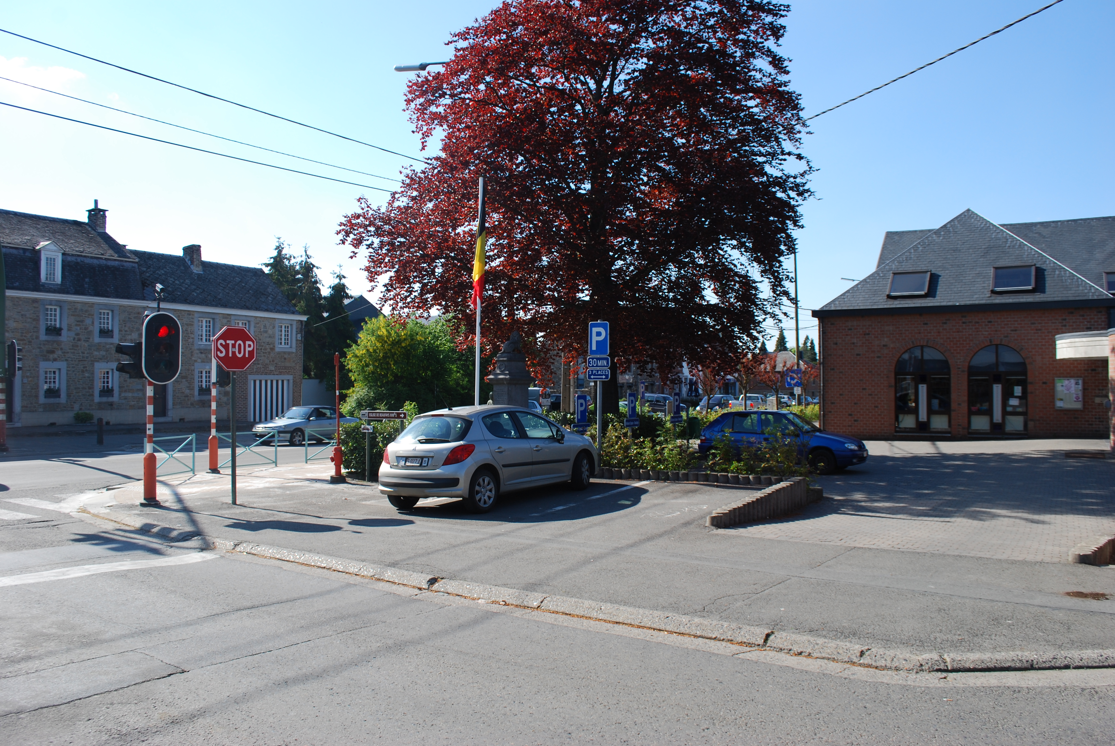 Vue de l'angle de la Voie de l'Air Pur et de la route de l'Abbaye, à Beaufays.